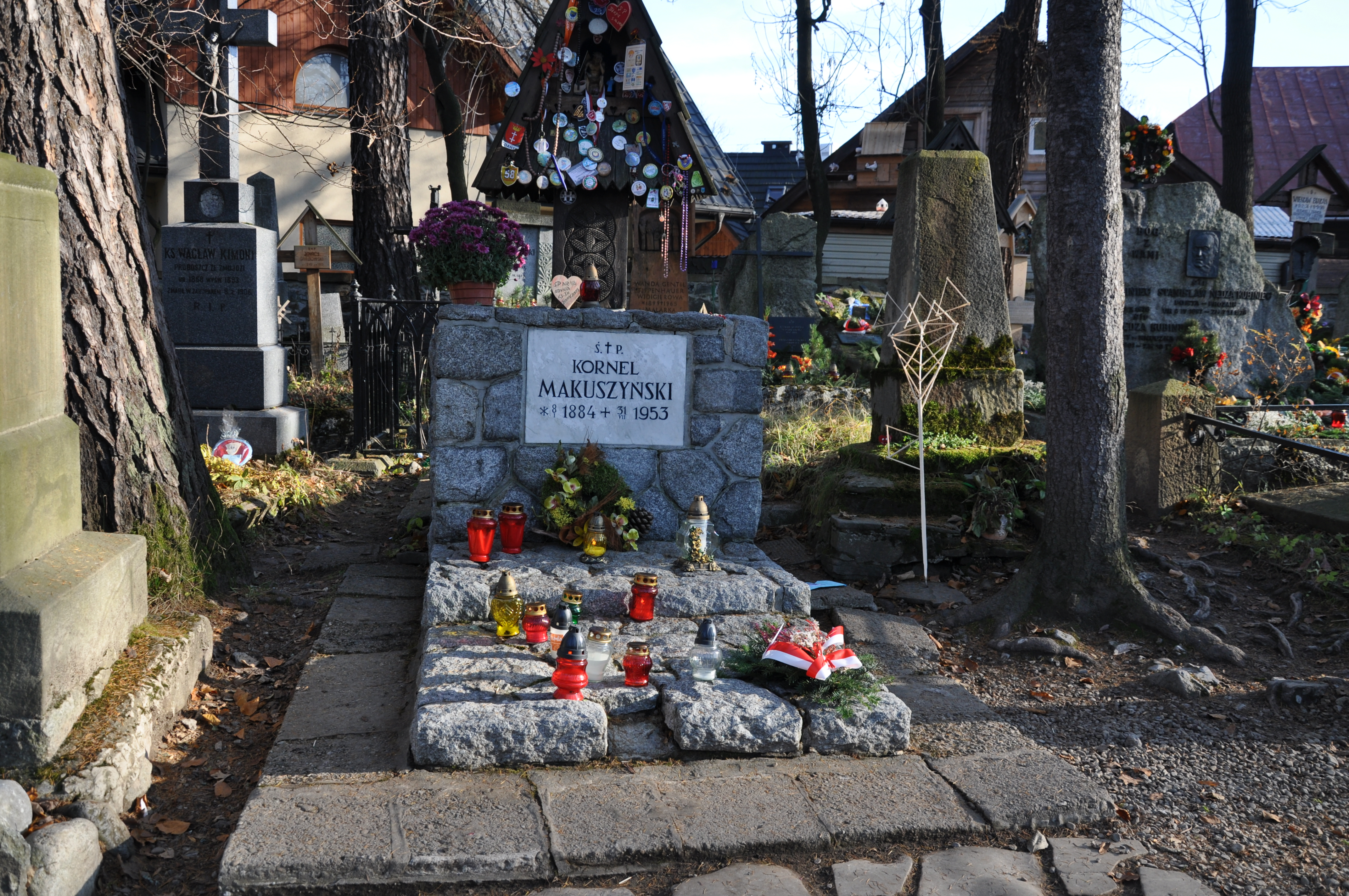 Grób Kornela Makuszyńskiego na Cmentarzu Zasłużonych na Pęksowym Brzyzku w Zakopanem